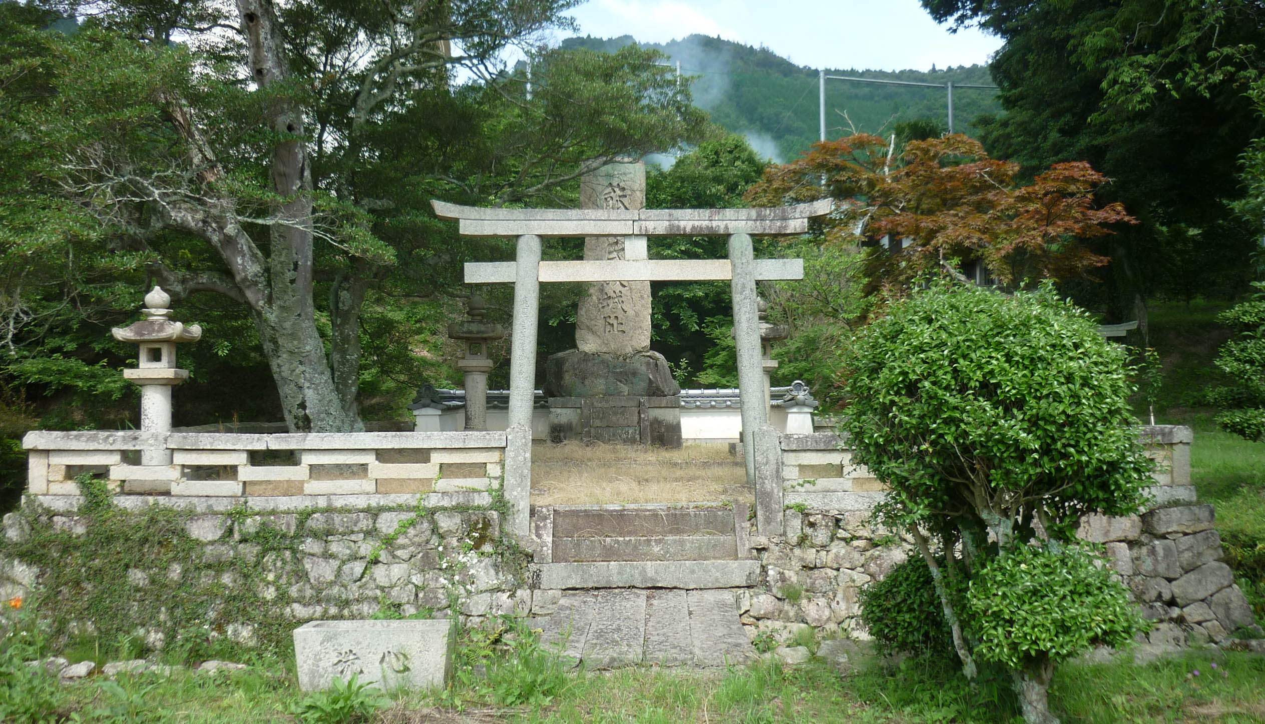 能勢氏故城址の石碑